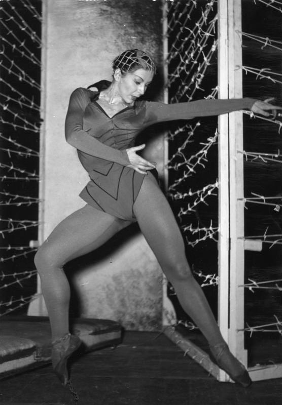 Düsseldorfer Opernhaus Tanzszene aus " Das Goldfischglas" nach der Musik des Holländers Andriessen. Choreographie: Yvonne Georgie Bühnenbild: Dr. Heinz Beisker Solistin: Edel von Rothe